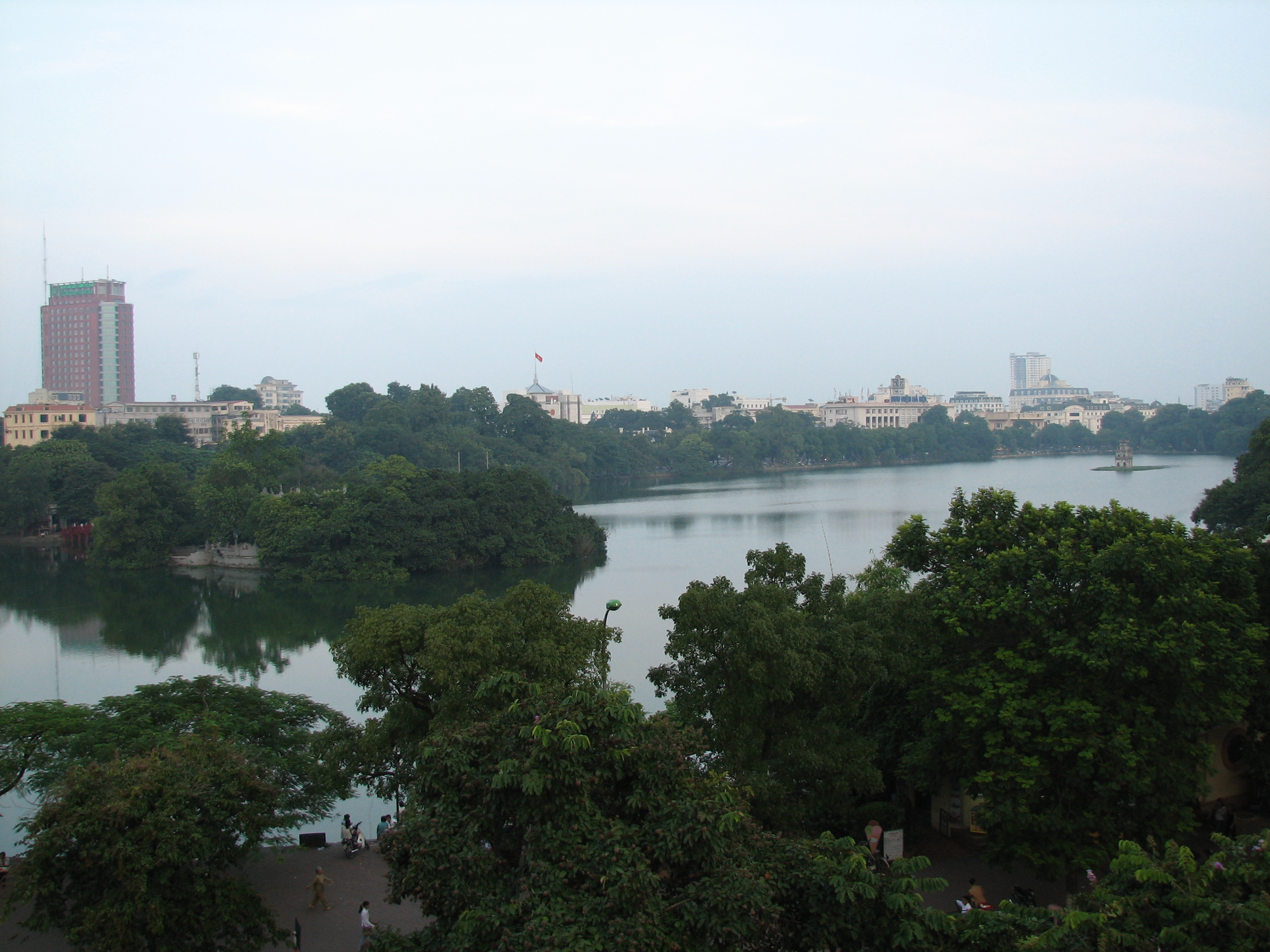 Toàn cảnh Hồ Hoàn Kiếm nhìn từ Quảng trường Đông Kinh Nghĩa Thục. Hình do người truyền lên chụp.